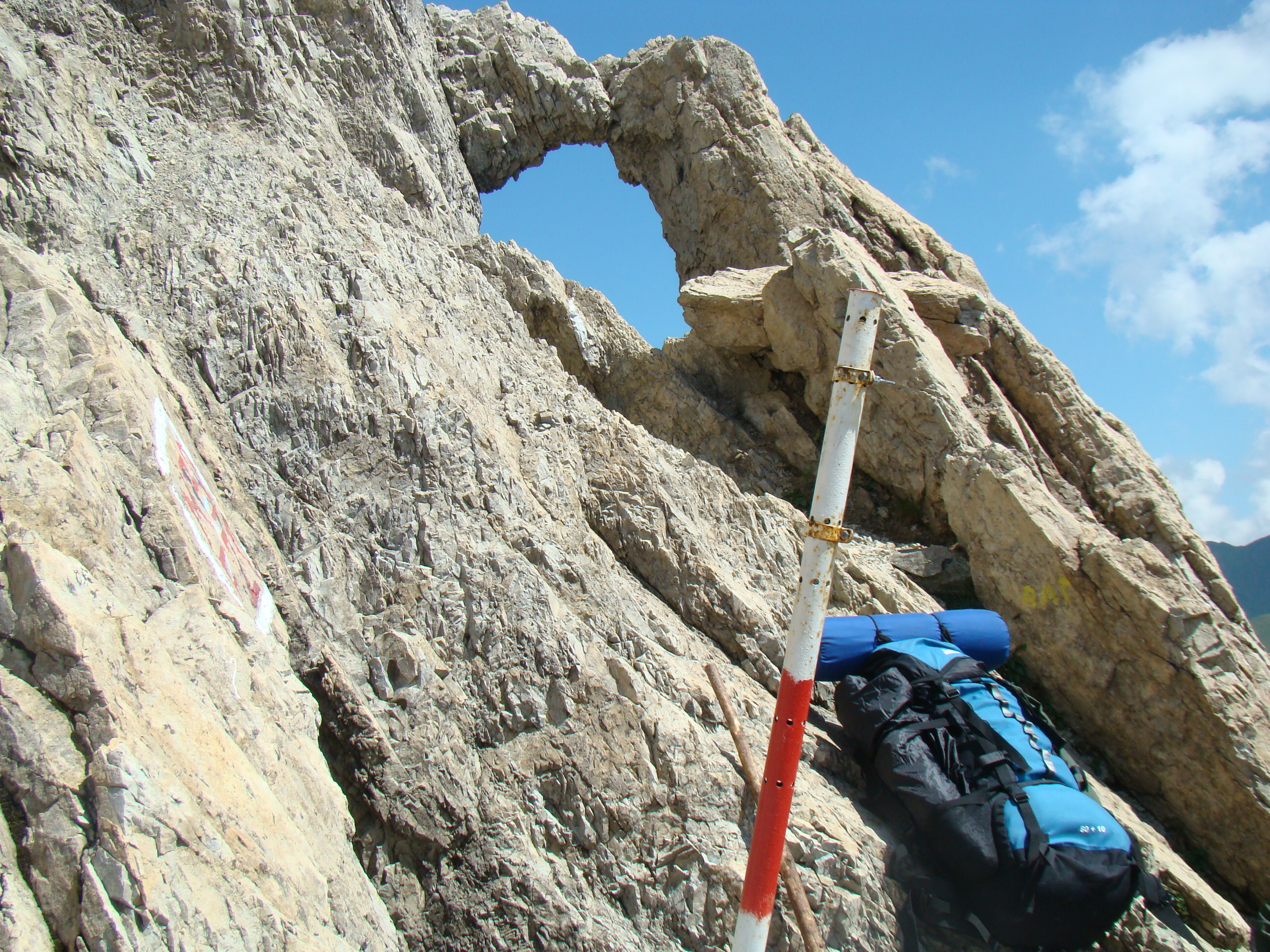 Munţii Făgăraş